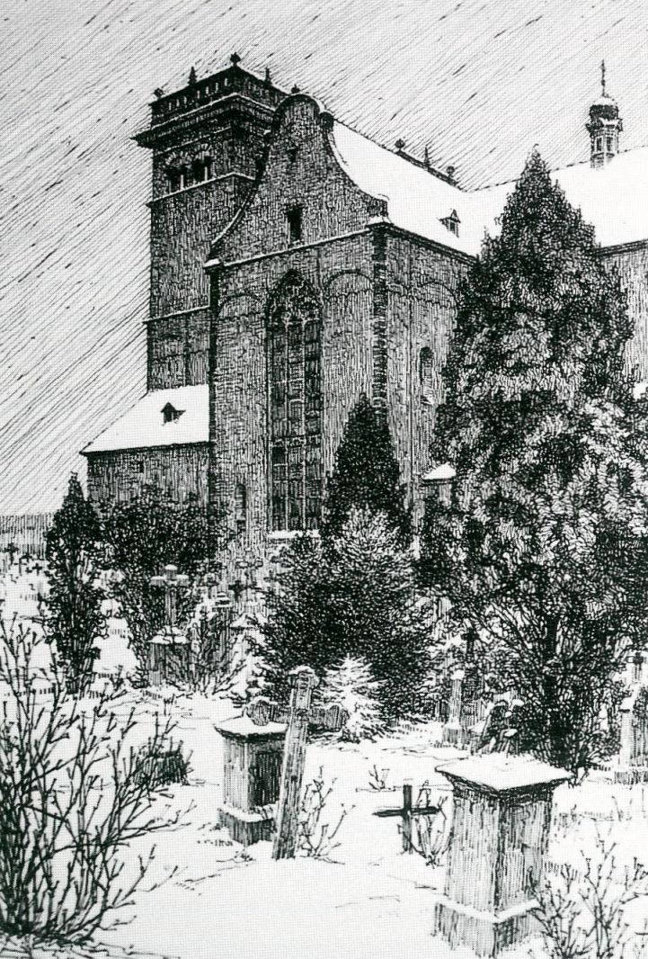 Fritz Quant: Matthiasbasilika von Norden (auch "Querhaus von St. Matthias im Schnee" genannt), Radierung, 1916, 26,1 x 17,4 cm (Stadtmuseum Simeonstift Trier)